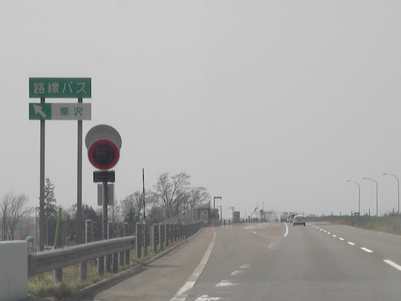 道央自動車道の栗沢バスストップ（札幌方面）を撮影